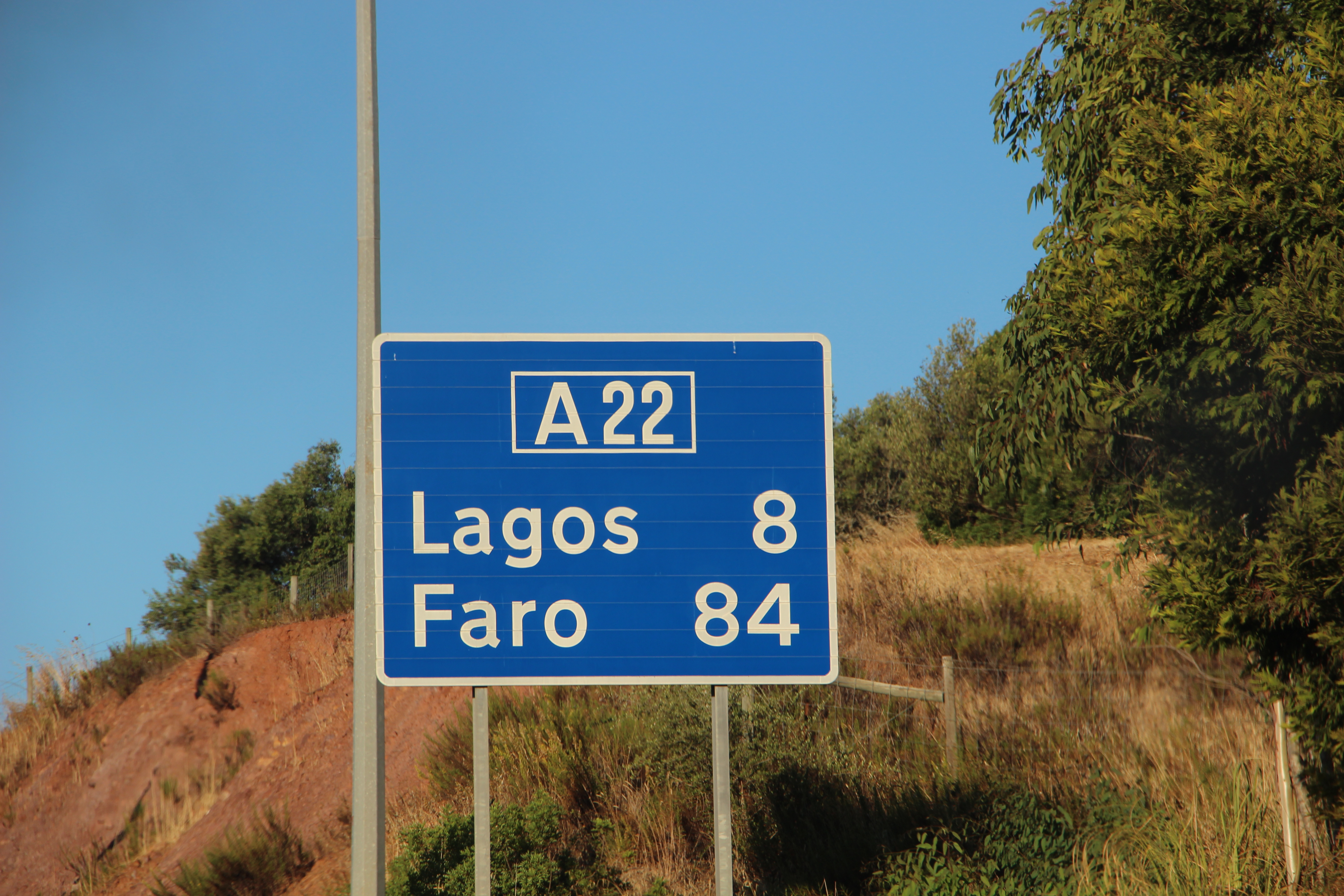 Sinal de confirmação, na autoestrada A22, perto de Bensafrim.